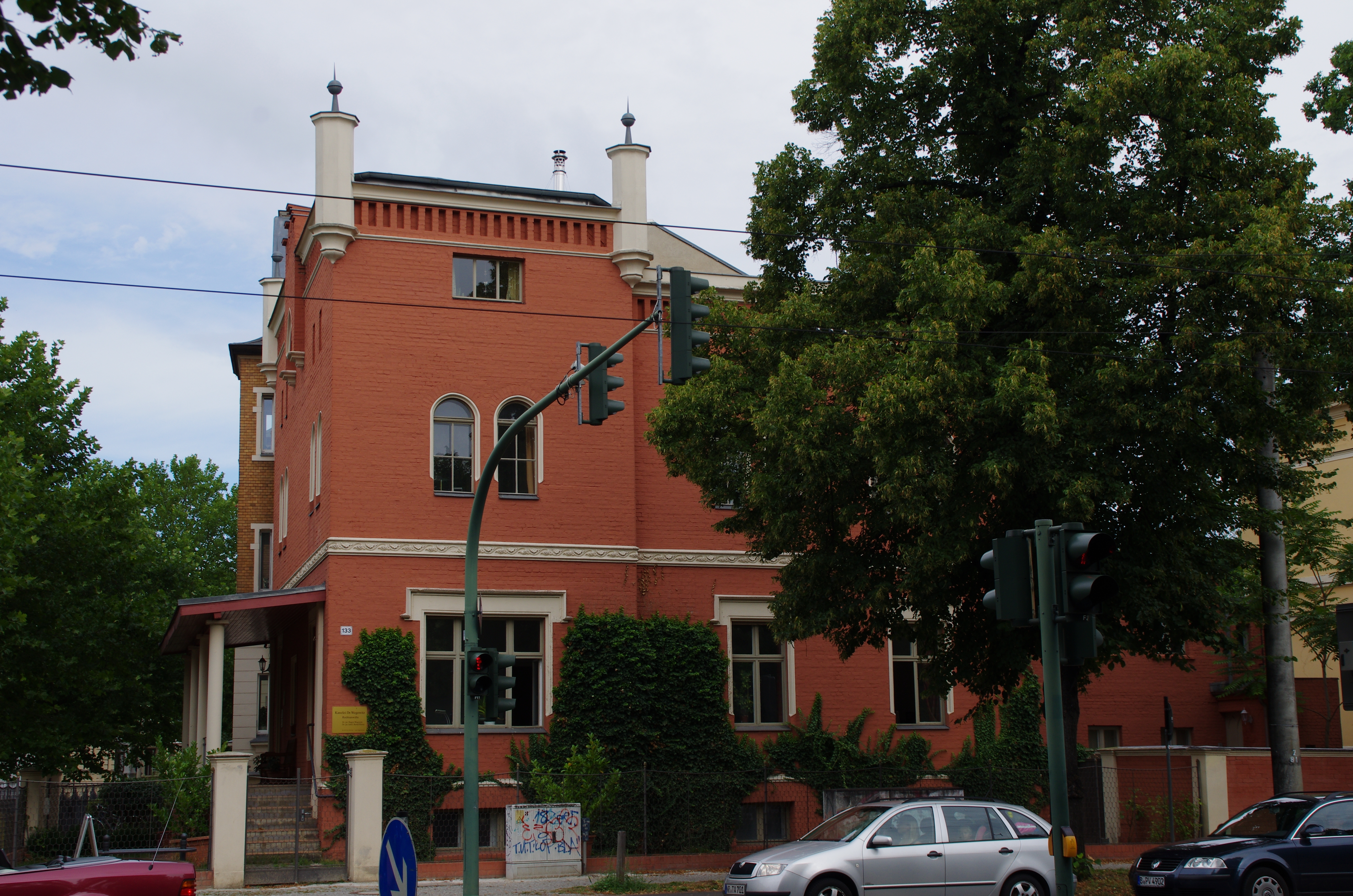 Potsdam in Brandenburg. Das Haus in der Straße Berliner Straße 133 steht unter Denkmalschutz.